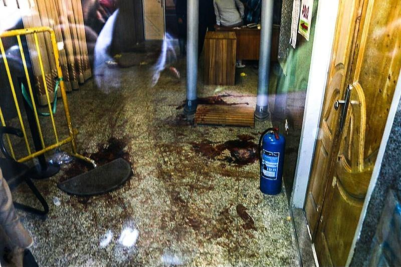 حمله تروریستی مجلس شورای اسلامی